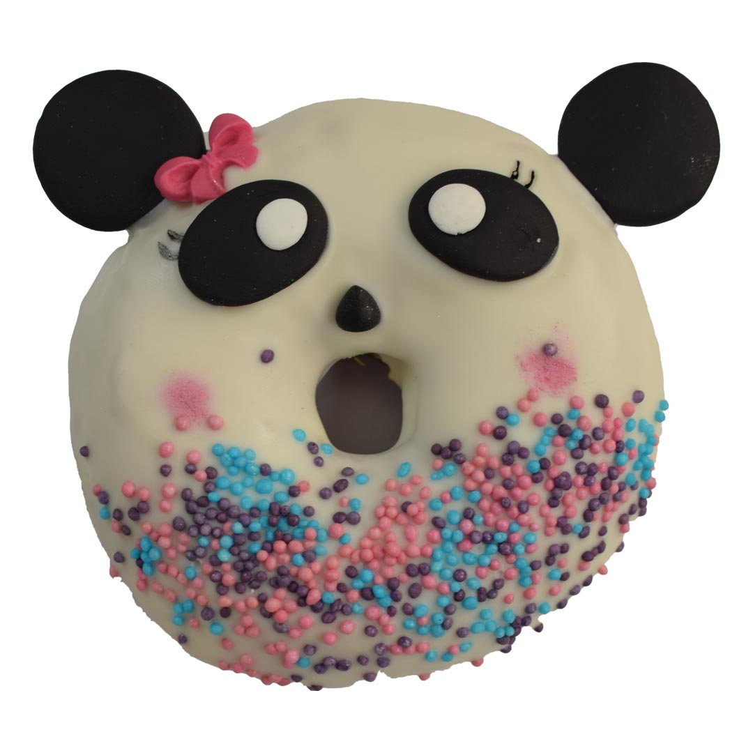 عکس دونات اجرا شده در خانه آبنبات چوبی